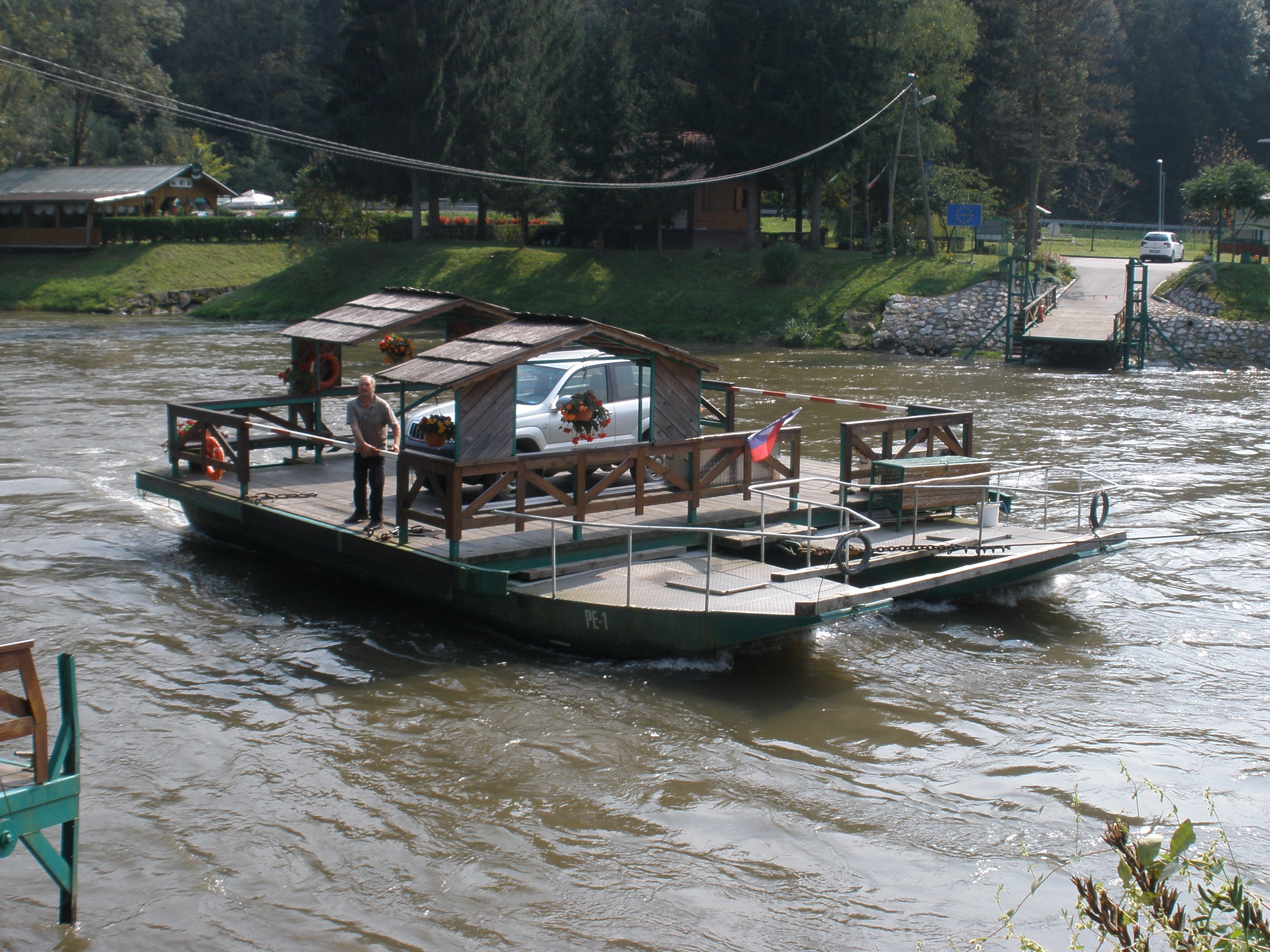 Die Rollfähre in Weitersfeld (Gemeinde Murfeld) verbindet die Steiermark mit Slowenien. Die Murfähre macht sich als Antrieb mittels eines über die Mur gespannten Drahtseiles lediglich die Flussströmung zunutze.